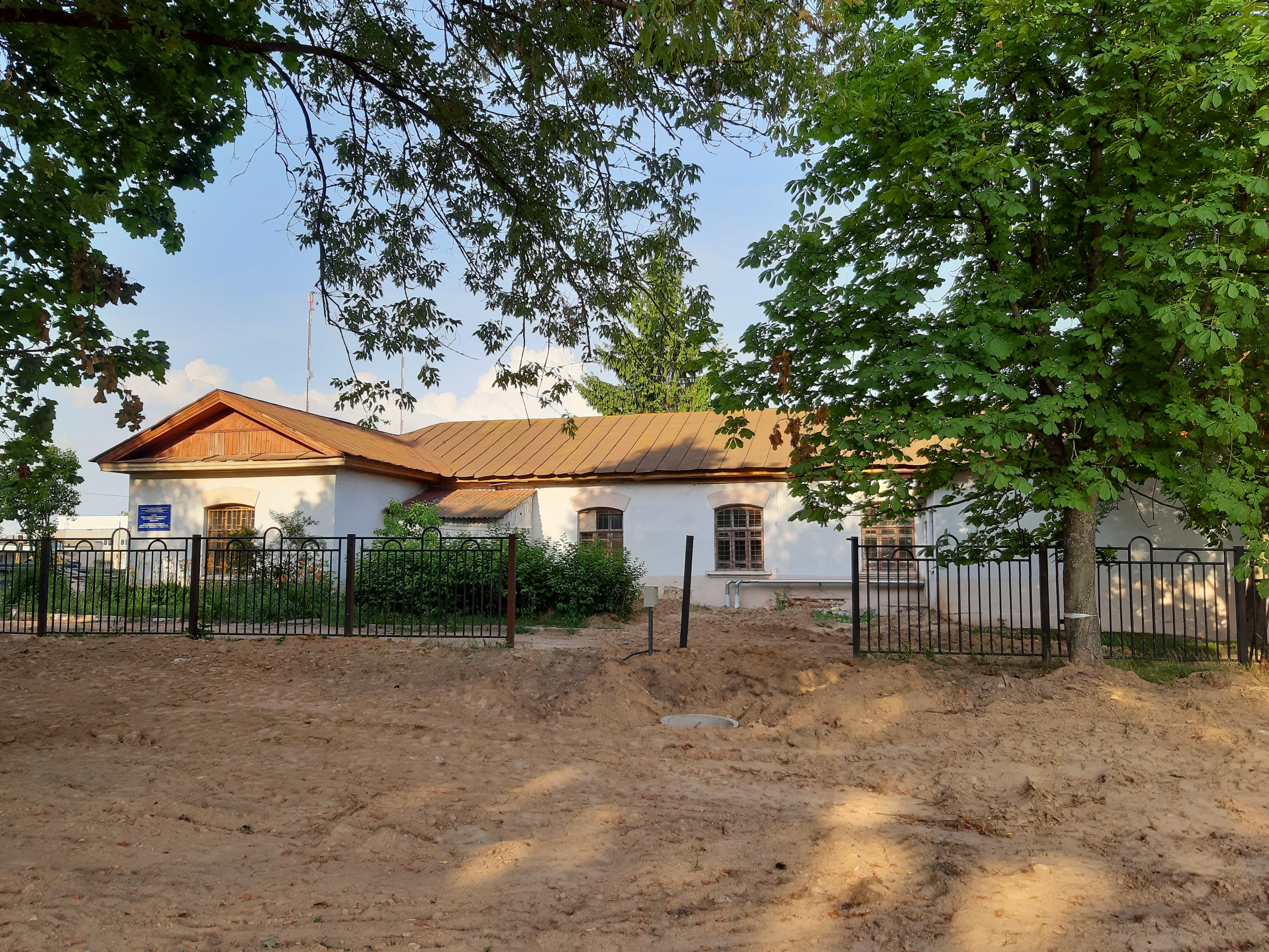 Магілёў. Вуліца Сурганава